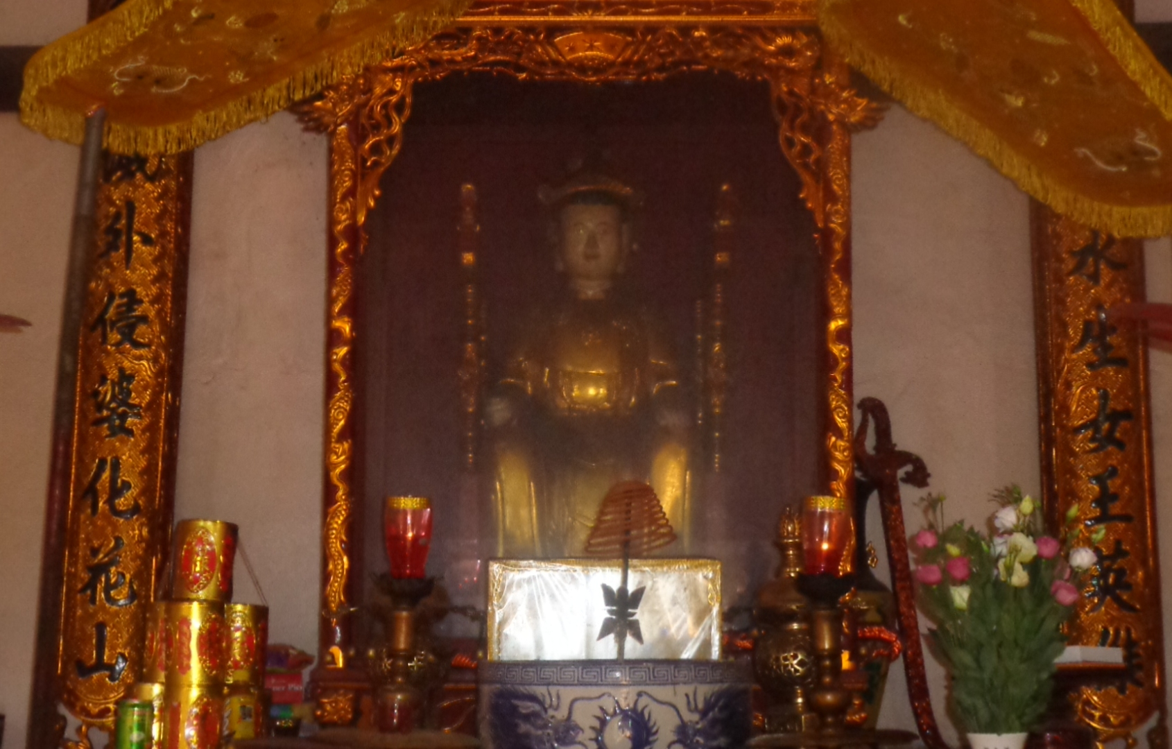 Tượng Bà Triệu tại đền thờ trên núi Nưa xã Tân Ninh huyện Triệu Sơn tỉnh Thanh Hóa.